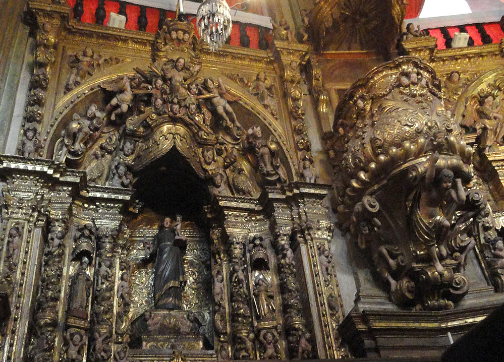 Igreja Matriz de Nossa Senhora do Pilar - Ouro Preto